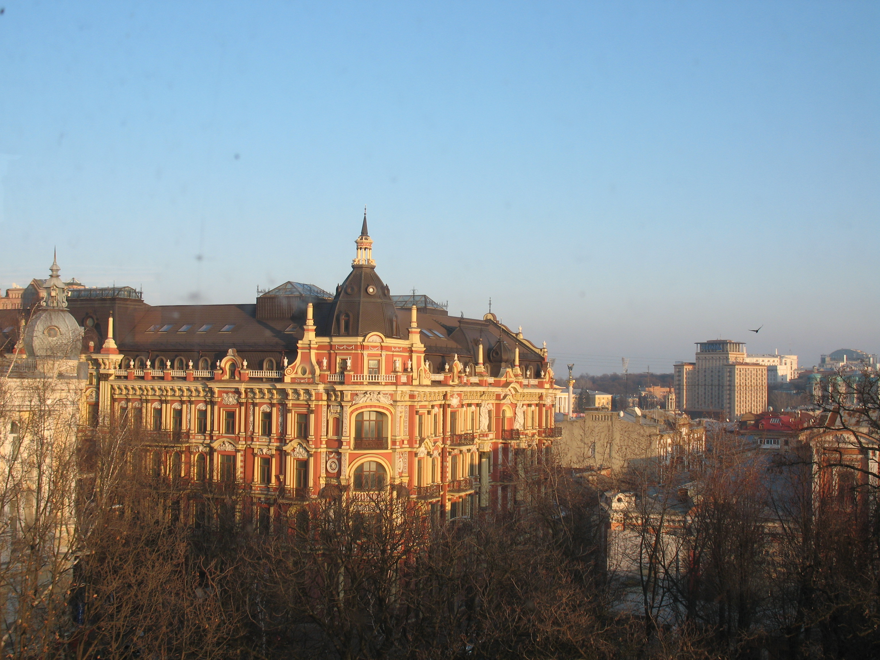 Будинок Сироткіна. Також відомий як готель та ресторан "Лейпціг"